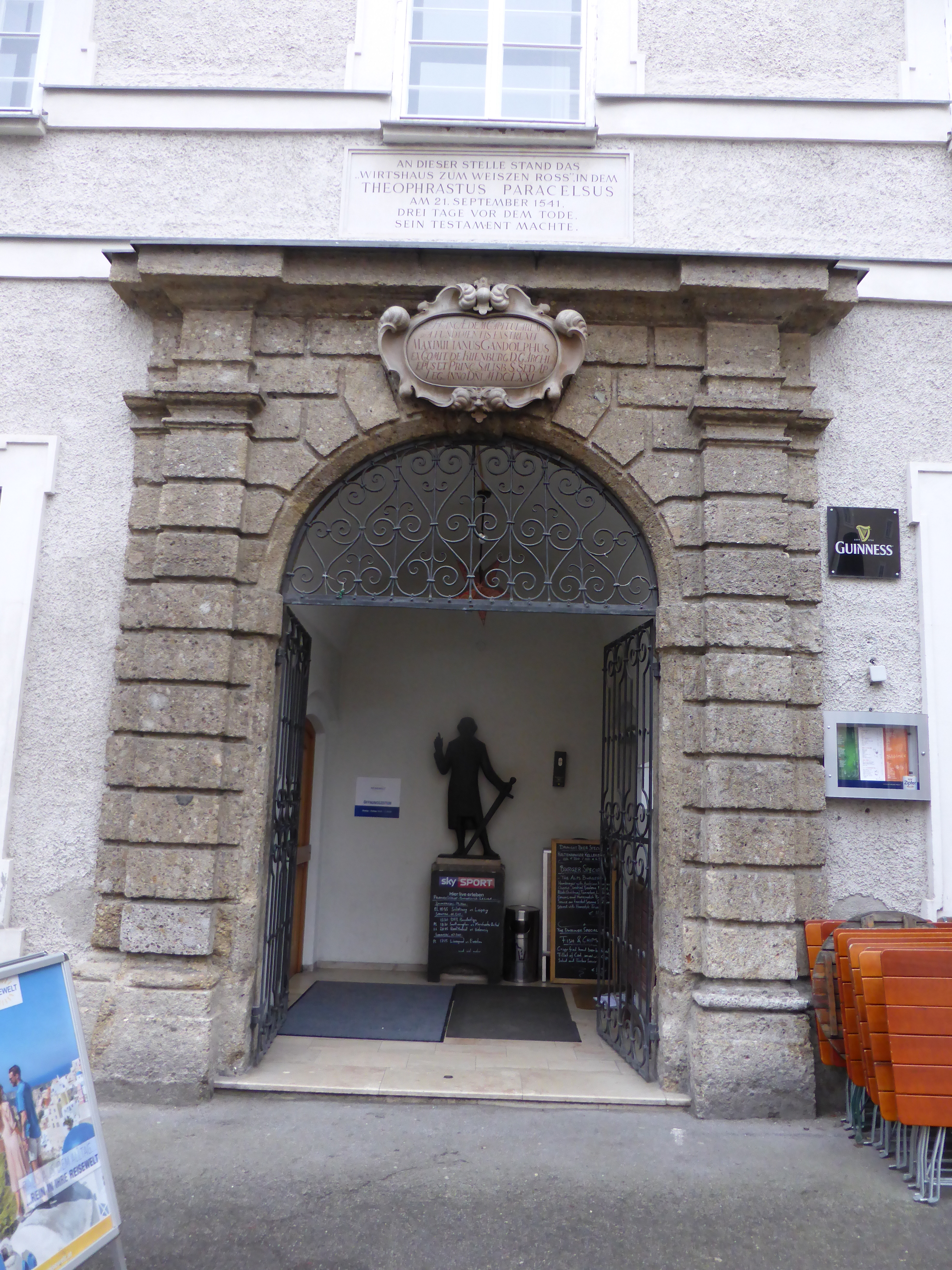 Kaigasse 8